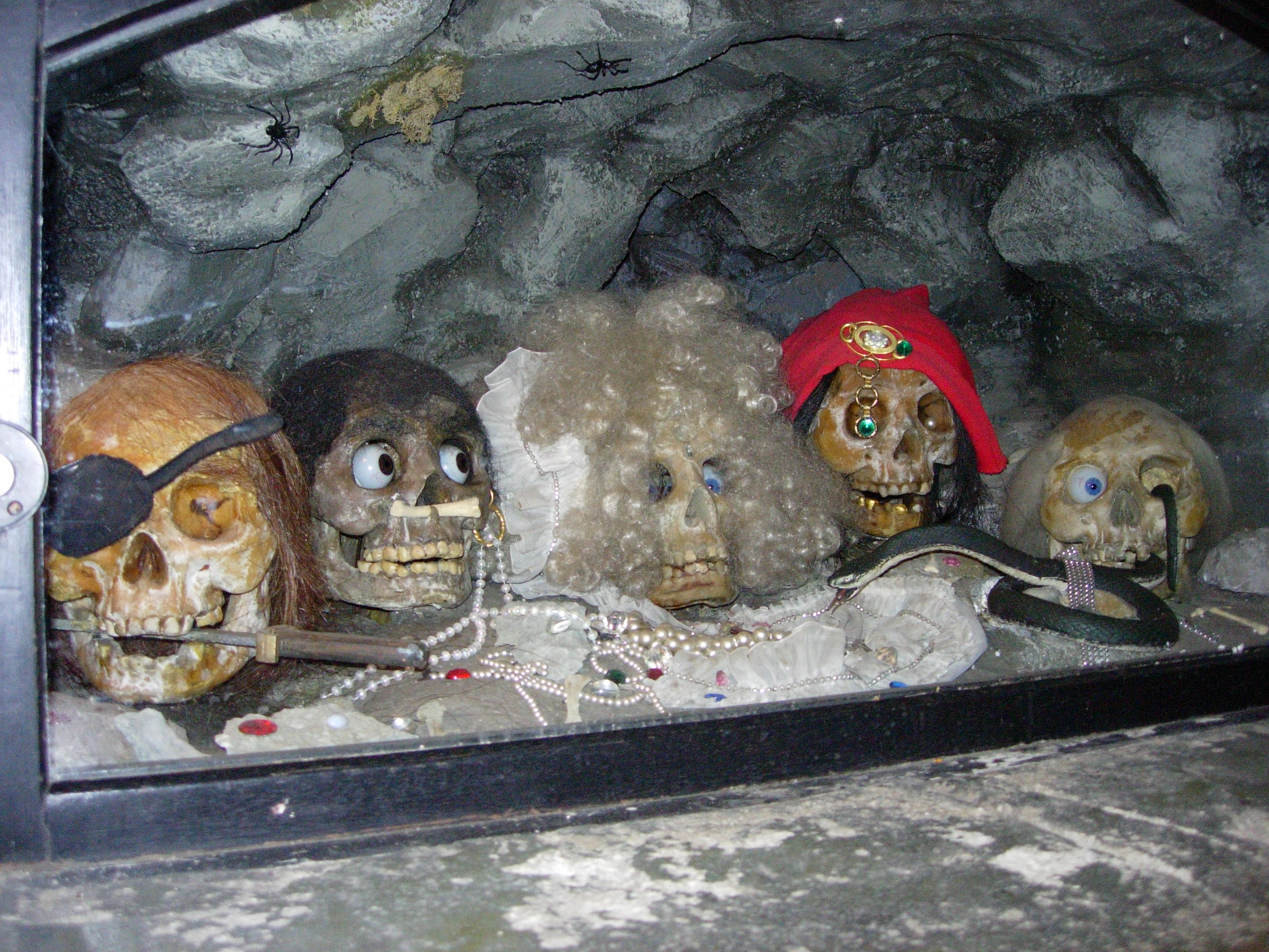 Couloir de Spookslot